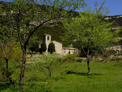 Església de Sant Martí de Talaixà. Talaixà. Alta Garrotxa. Girona.